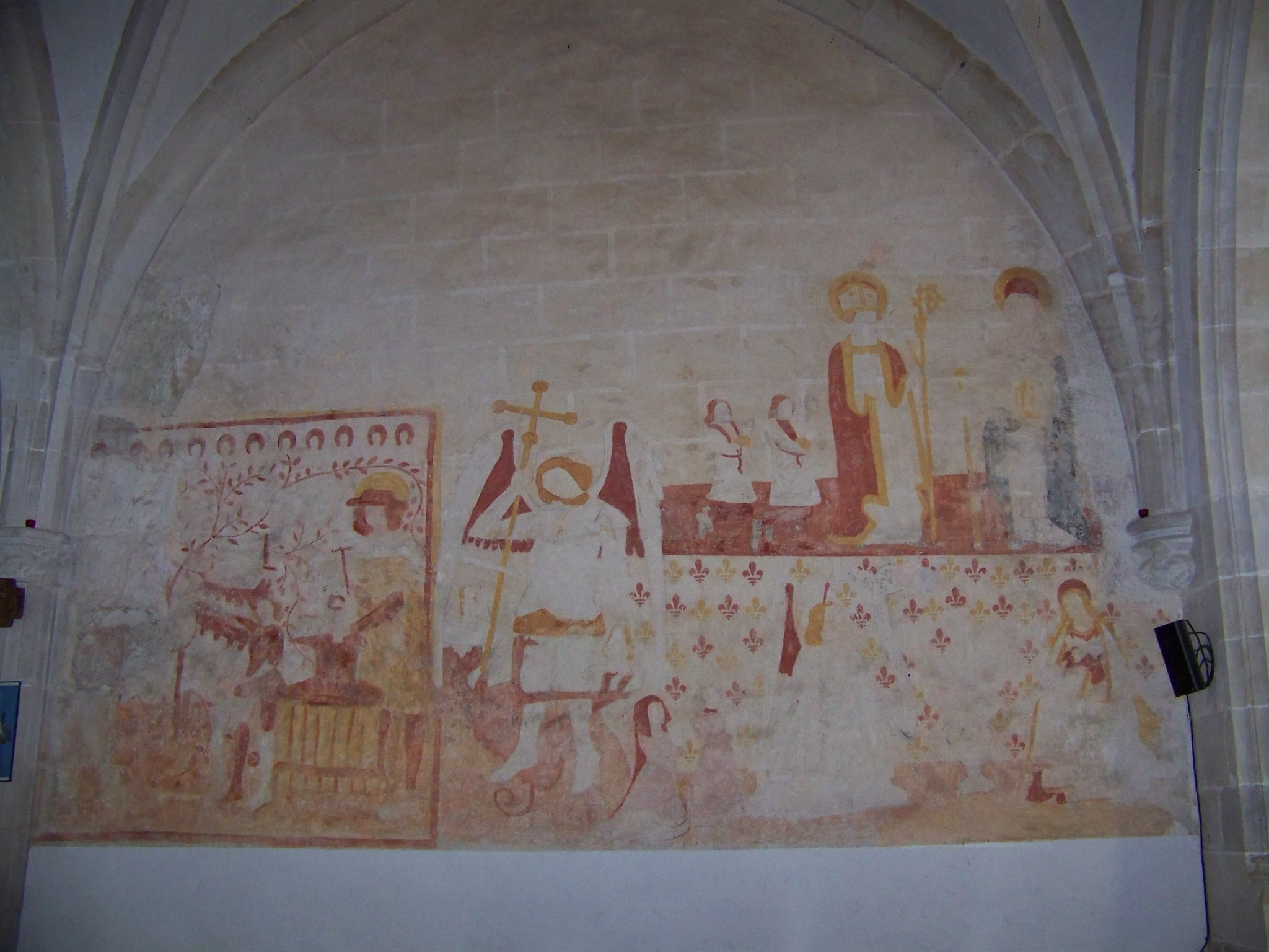 Fresque du XVe siècle, église Saint-Martin de Champniers.